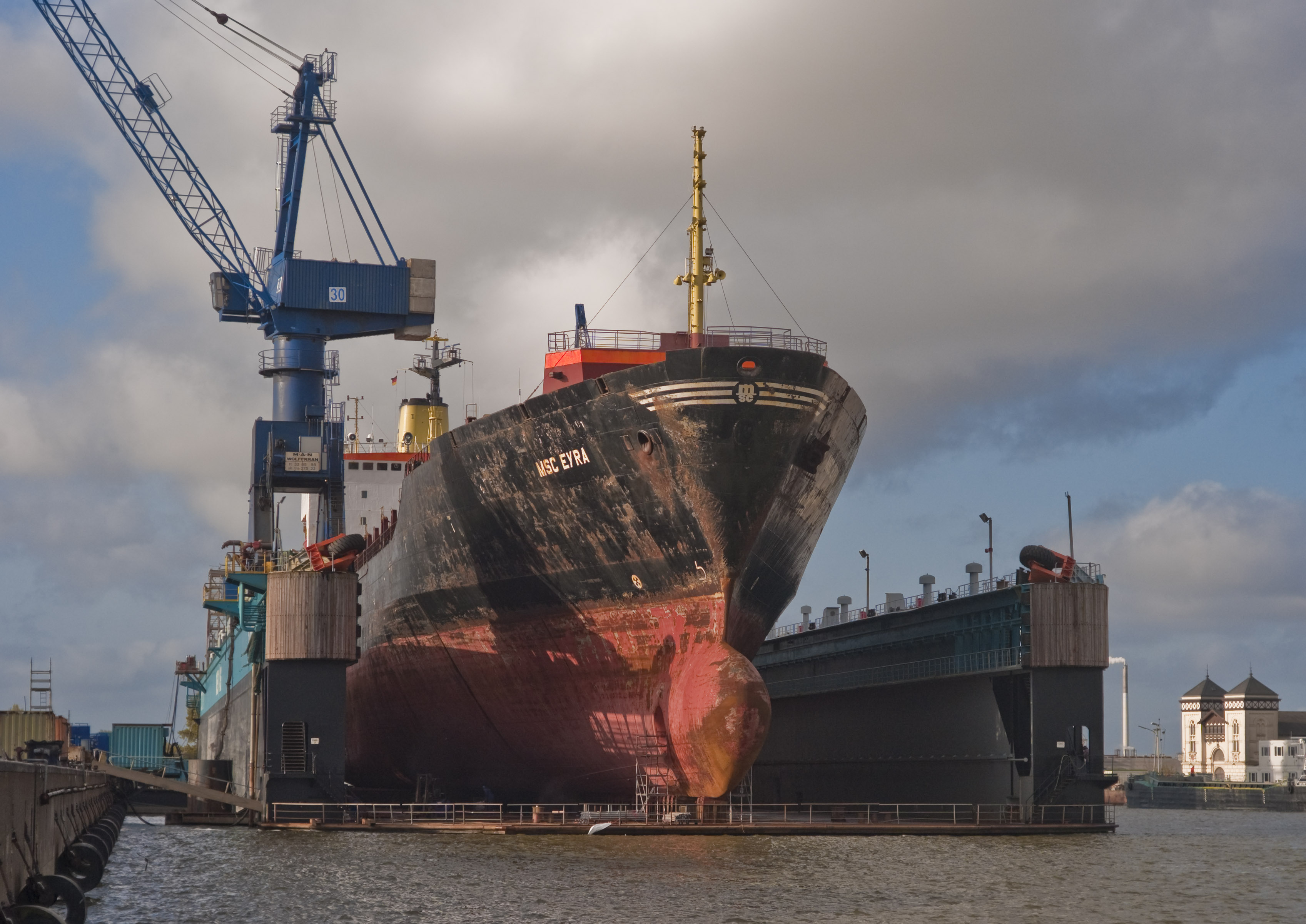 Floating dock of Motorenwerke Bremerhaven (MWB)